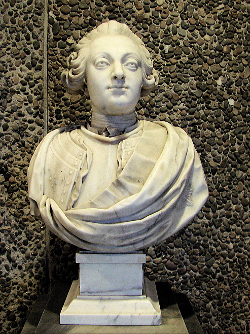 Frederik V, marmor af Luigi Grossi efter skulptur af Saly, Rigshospitalet, København